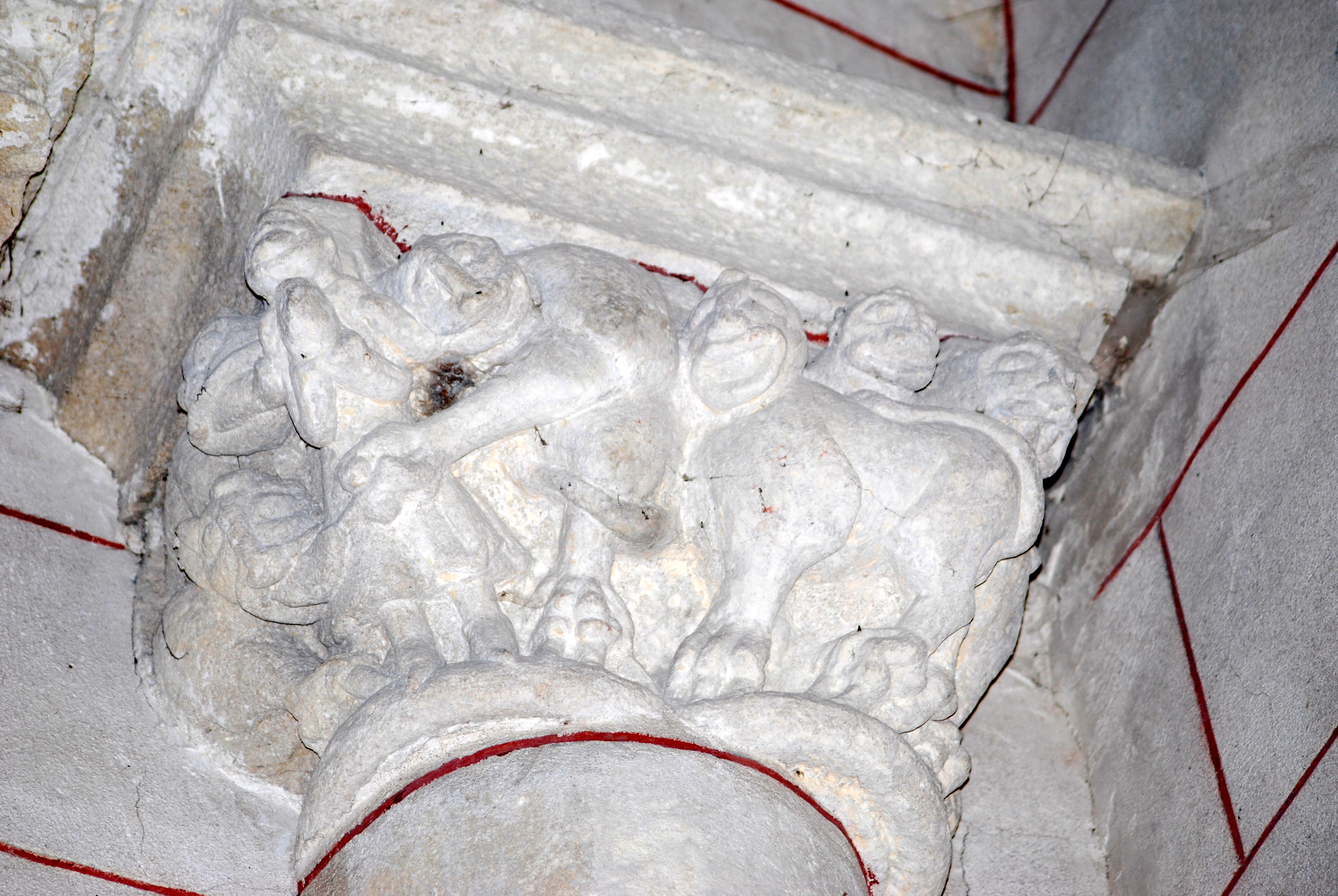 Église Notre-Dame de Doulezon